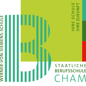 aktuelles Logo der Werner-von-Siemens-Schule